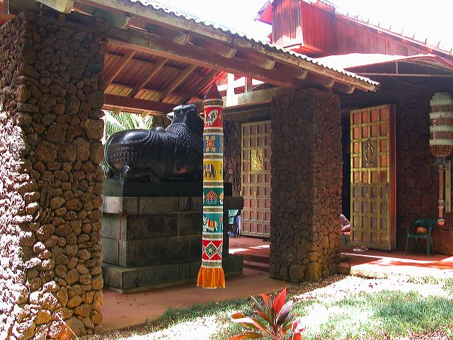 Kadavul Temple, Kauai's Hindu Monastery, Kapaa, Kauai, Hawaii.